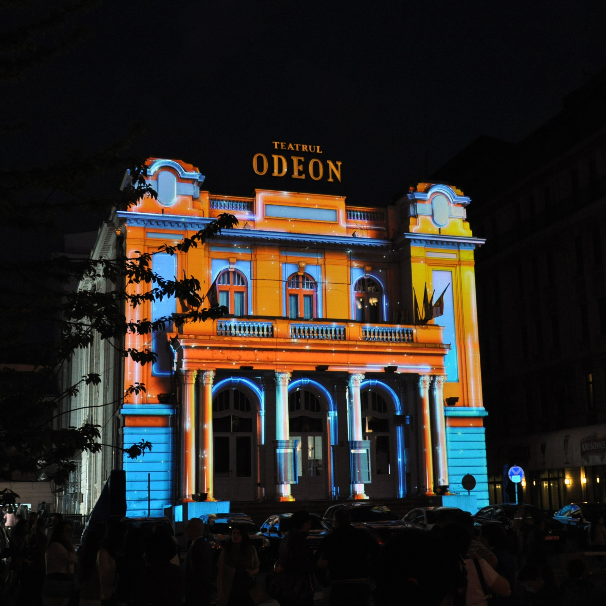 Teatrul Odeon